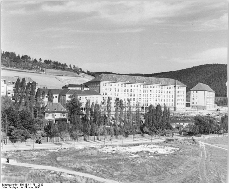 Aue, Kreiskrankenhaus Zentralbild Schlegel 4.10.1956 Kreiskrankenhaus in Aue. 20 Millionen DM wurden von der Regierung der DDR in den Neubau des Kreiskrankenhauses Aue-Sa., das "Ernst Scheffler-Krankenhaus Aue" investiert. 1050 Patienten können in den verschiedenen Spezialabteilungen Aufnahme finden. In der gesondert untergebrachten Infektionsabteilung steht auch eine "Eiserne Lunge" zum Einsatz bereit. UBz: Blick auf das "Ernst Scheffler-Krankenhaus Aue".